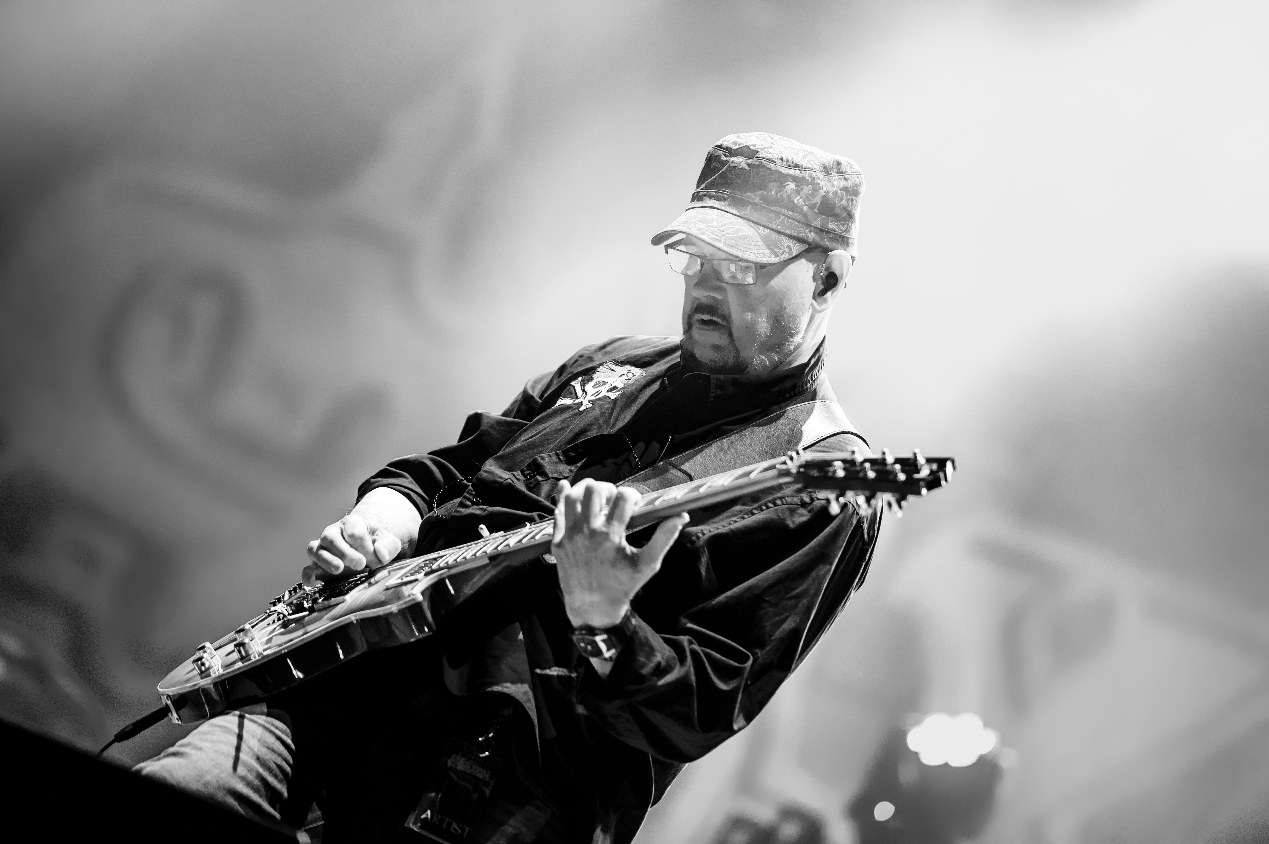 'RockHarz Open Air 2016; Ballenstedt': 'Saxon'